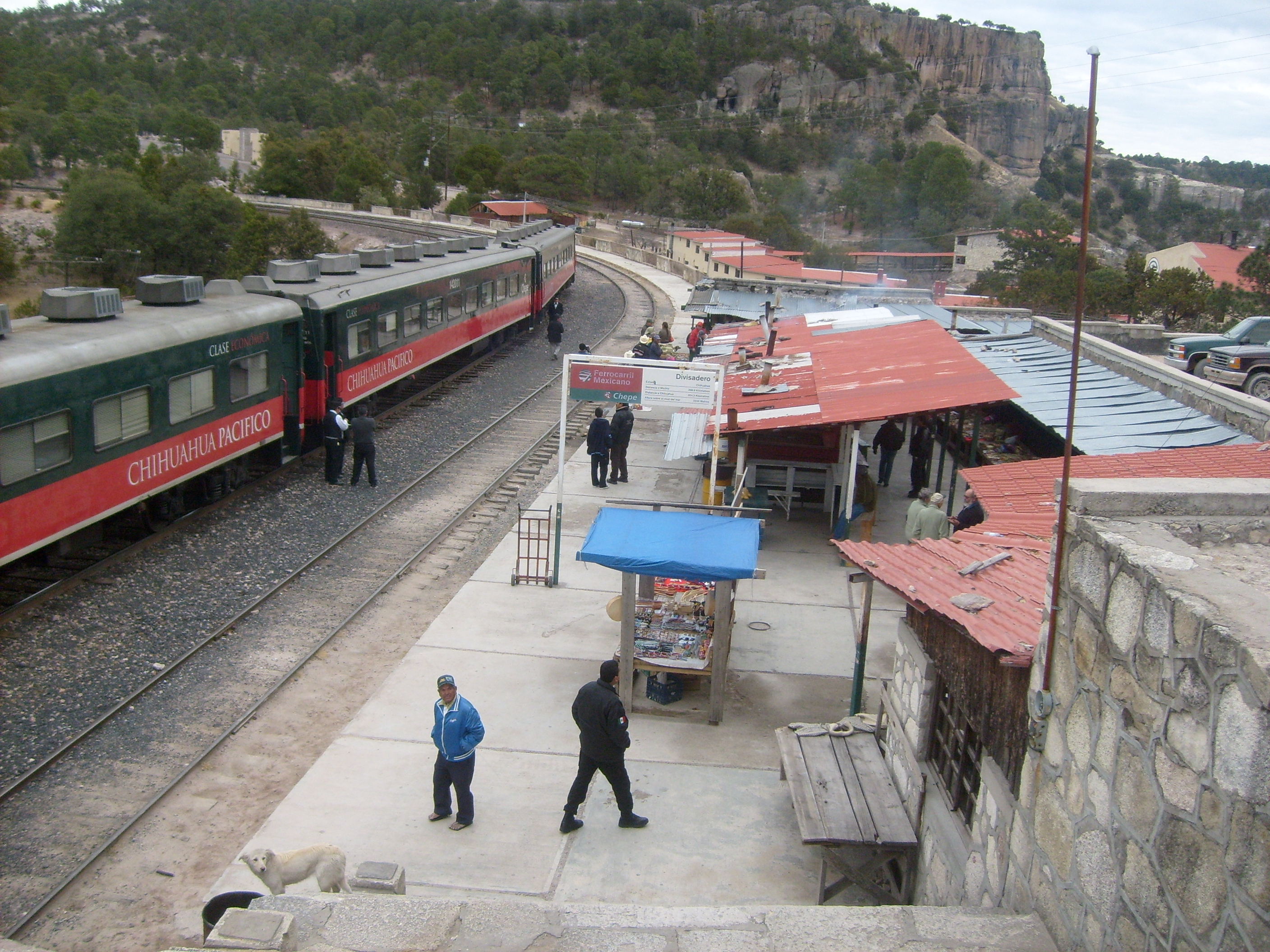 esta es la estacion intermedia del recorrido porel chepe aquie es donde se encuentran las barrancas del cobre